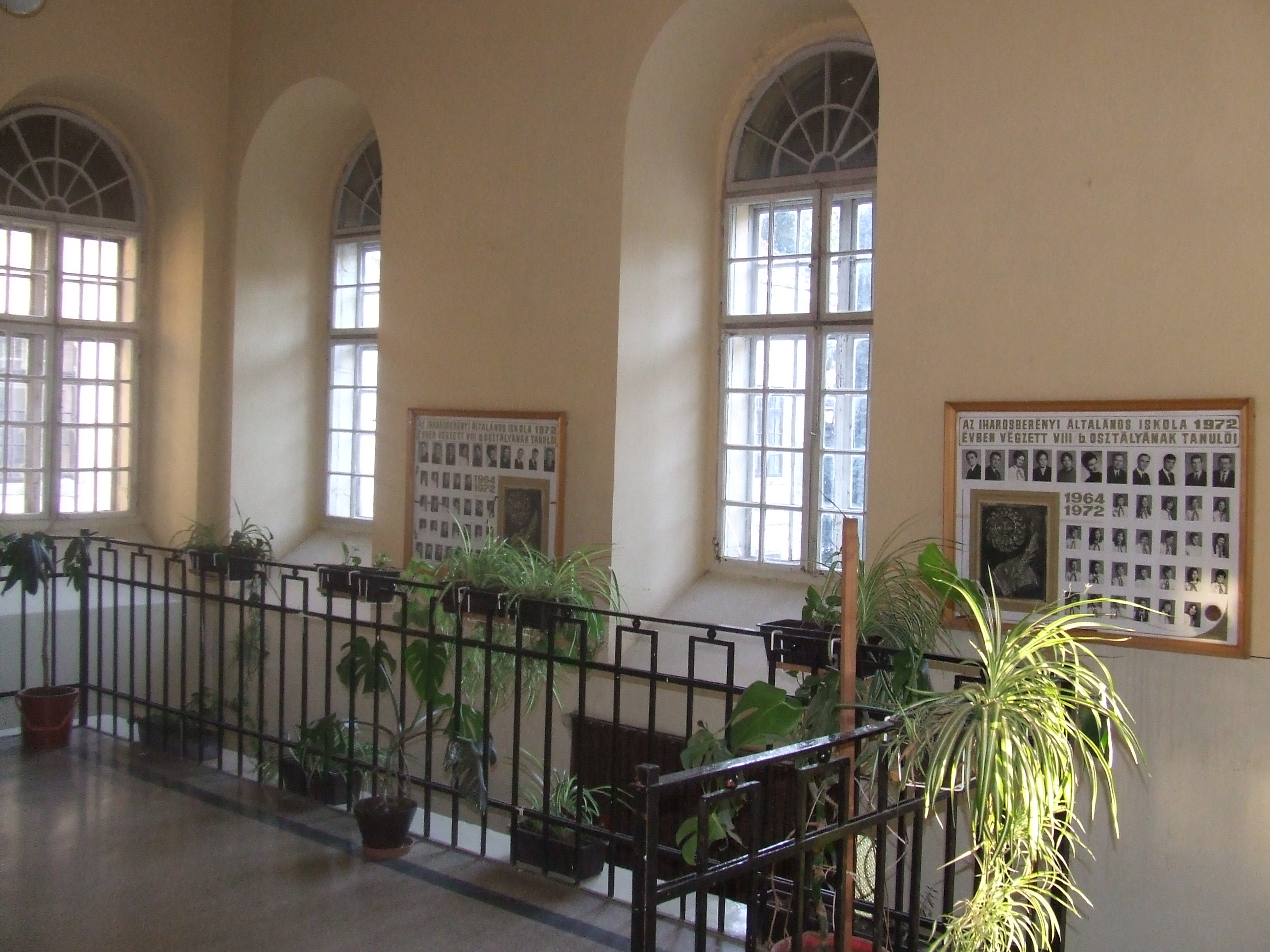 Iharosberény. Kastély belső